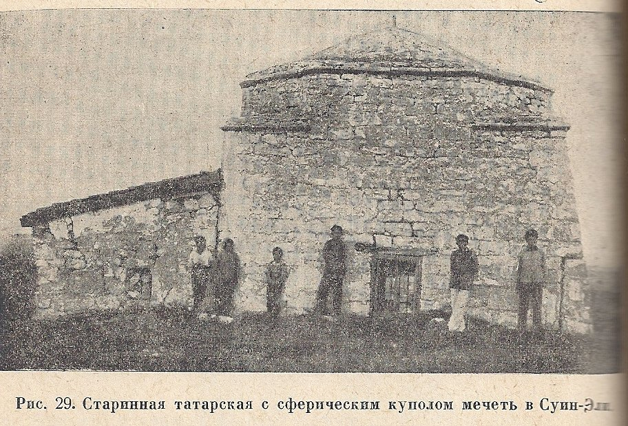 Старинная мечеть в селе Суин-Эли (Борисовка) Крым, 1914 год.